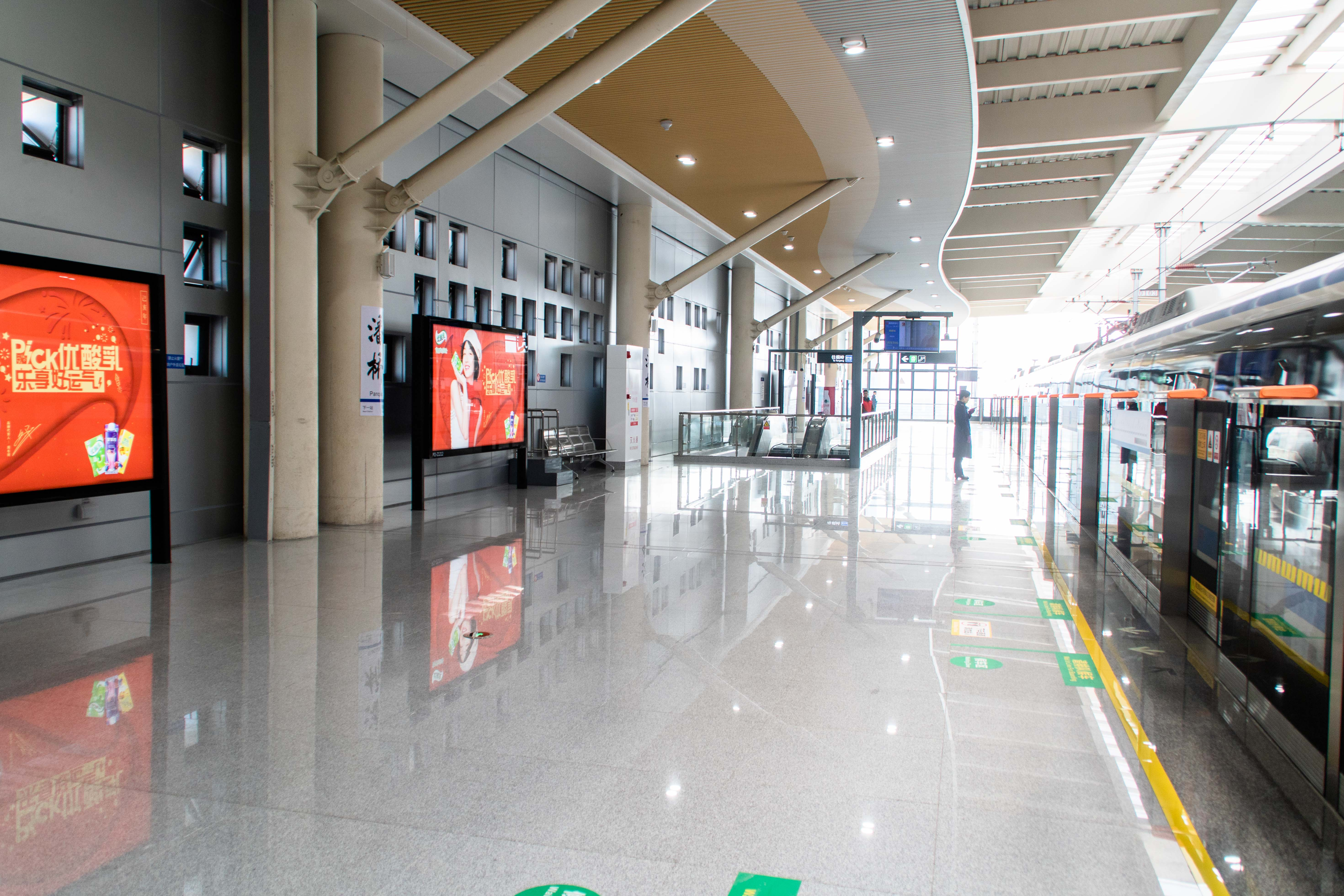 中文（中国大陆）: 新桥站站台